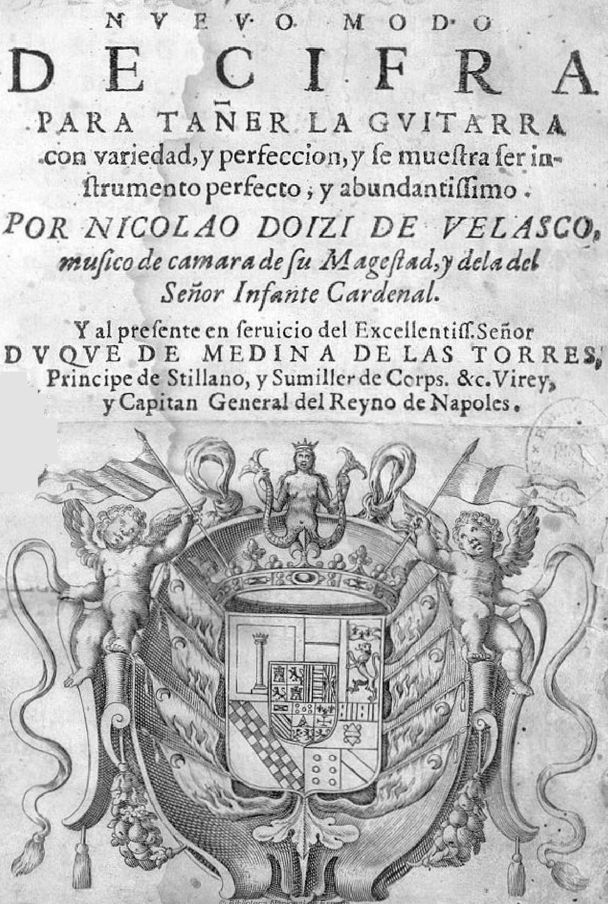 "Nuevo Modo de Cifra Para Tañer La Guitarra" por Nicolau Dias de Velasco, publicado em Nápoles em 1640.